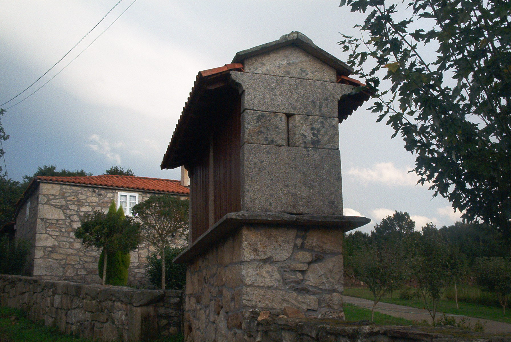 Hórreo en Bertosende (Antas de Ulla)